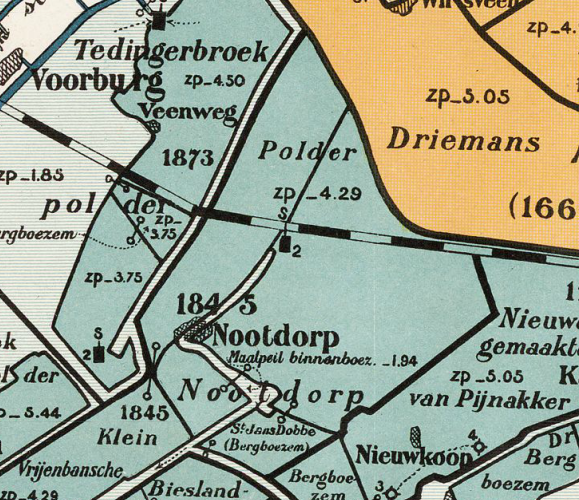 Polder Nootdorp